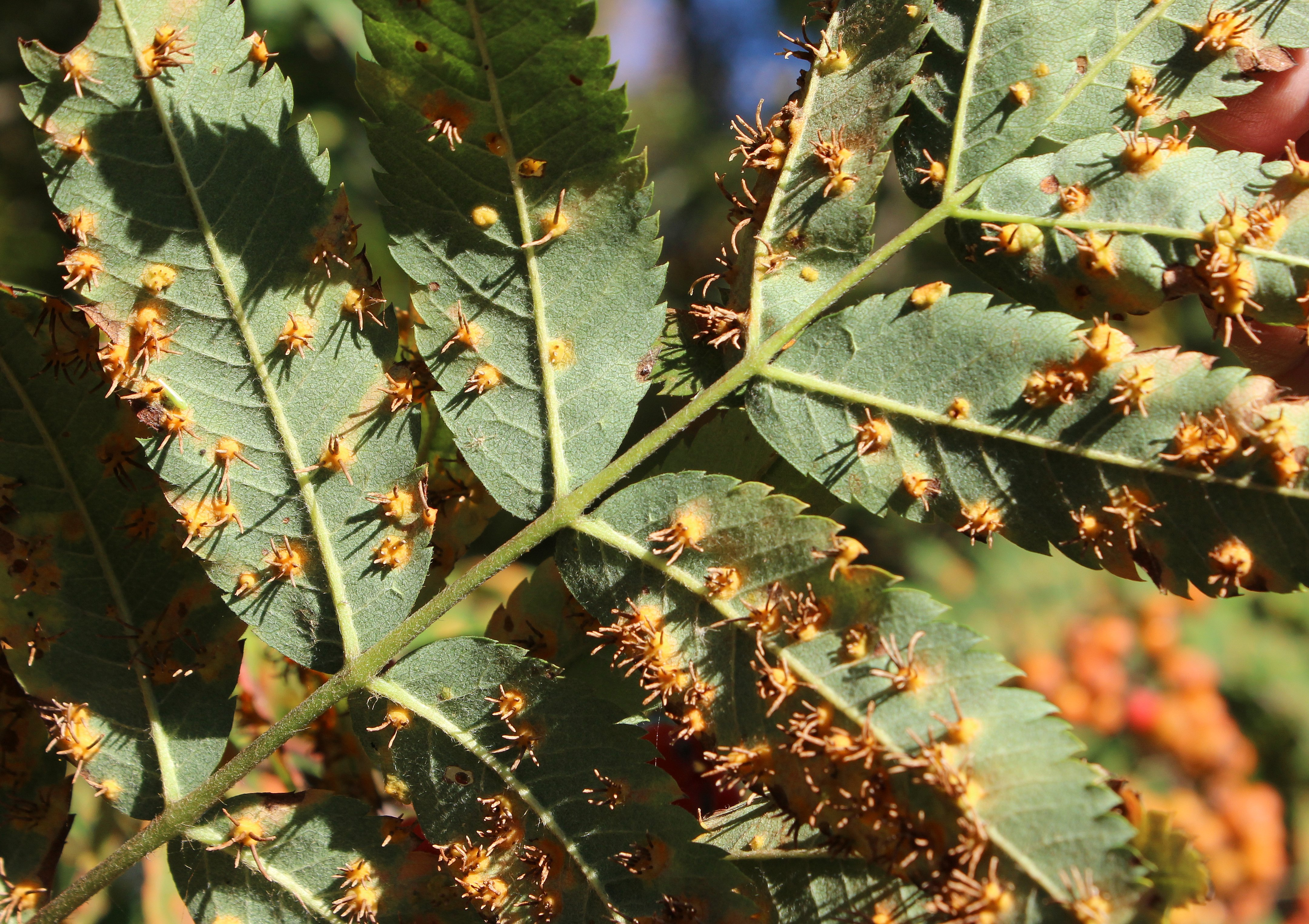 Katajanpihlajaruostetta (Gymnosporangium cornutum) pihlajan lehdillä Maksniemessä, Simossa.